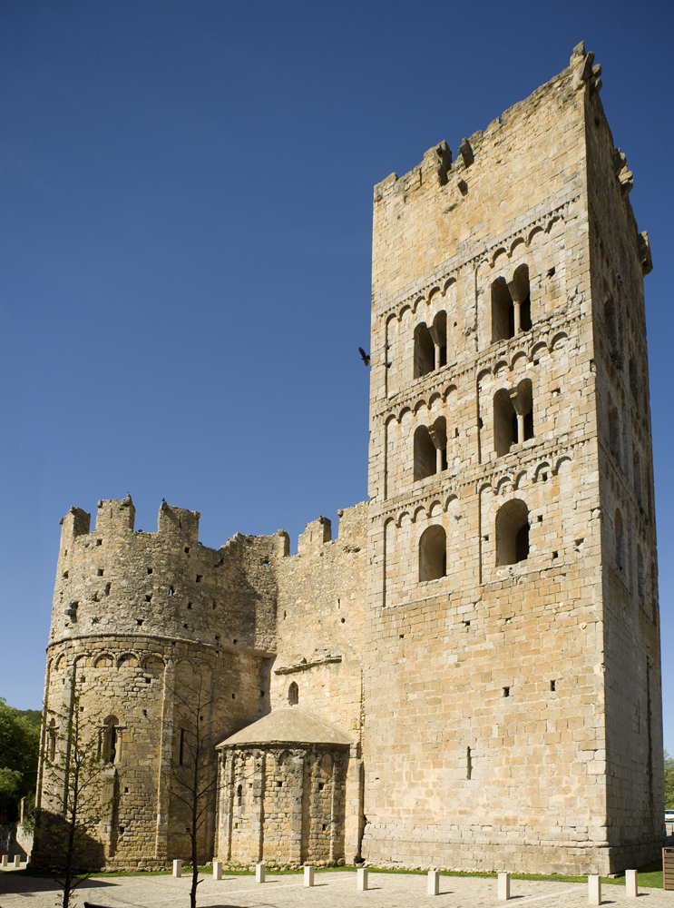 cultural heritage of Spain RI-51-0000563